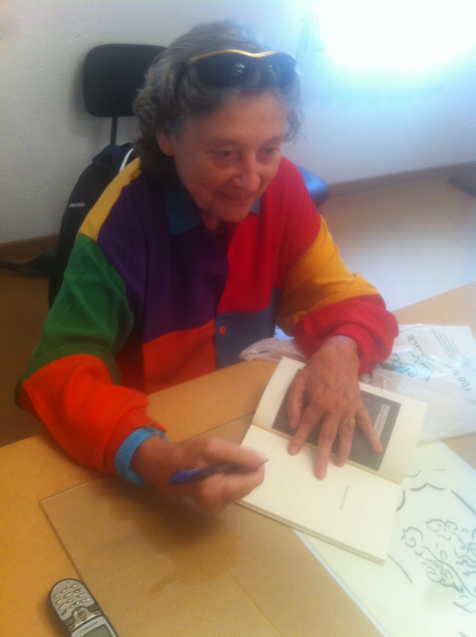 L'artista Fina Miralles (Sabadell, 1950) presenta la seva obra "Serrallonga" a Agramunt